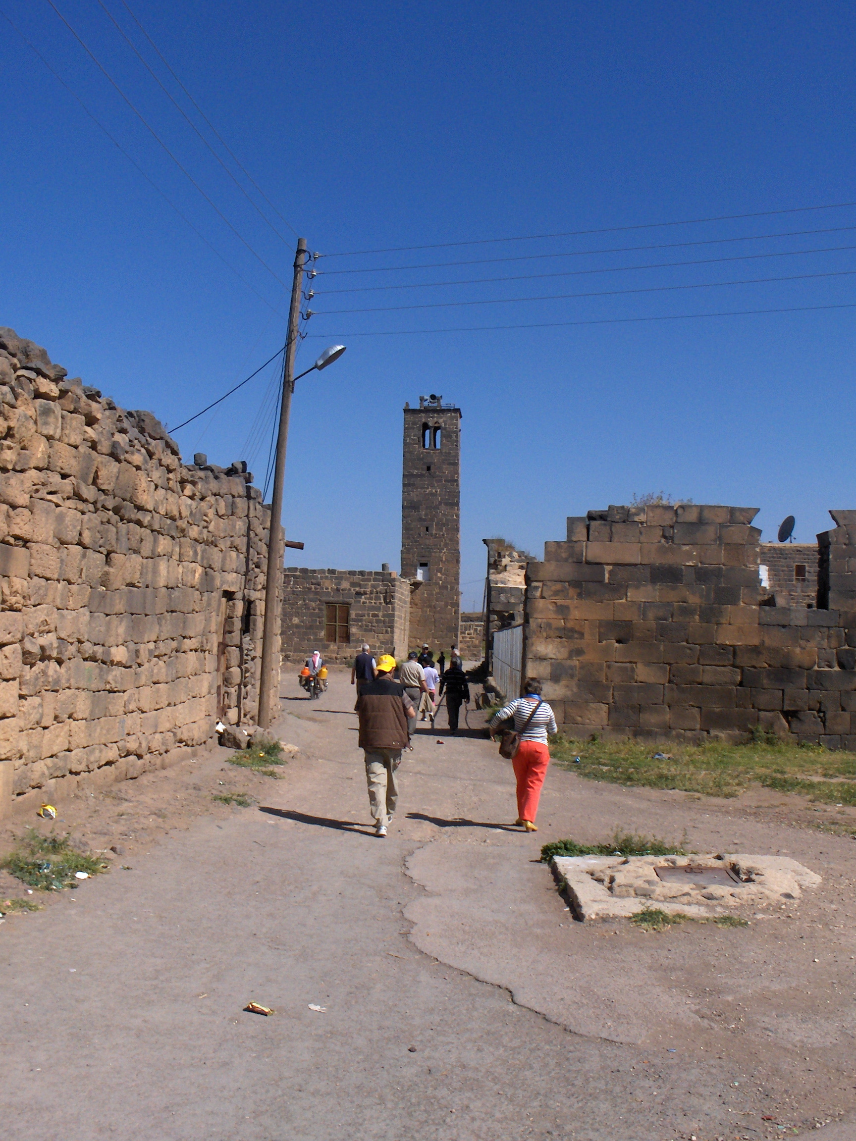 la moschea di Fatima di Bosra, Siria